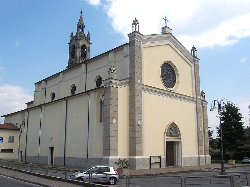 Cividino - Chiesa Parrocchiale della B.V. Addolorata